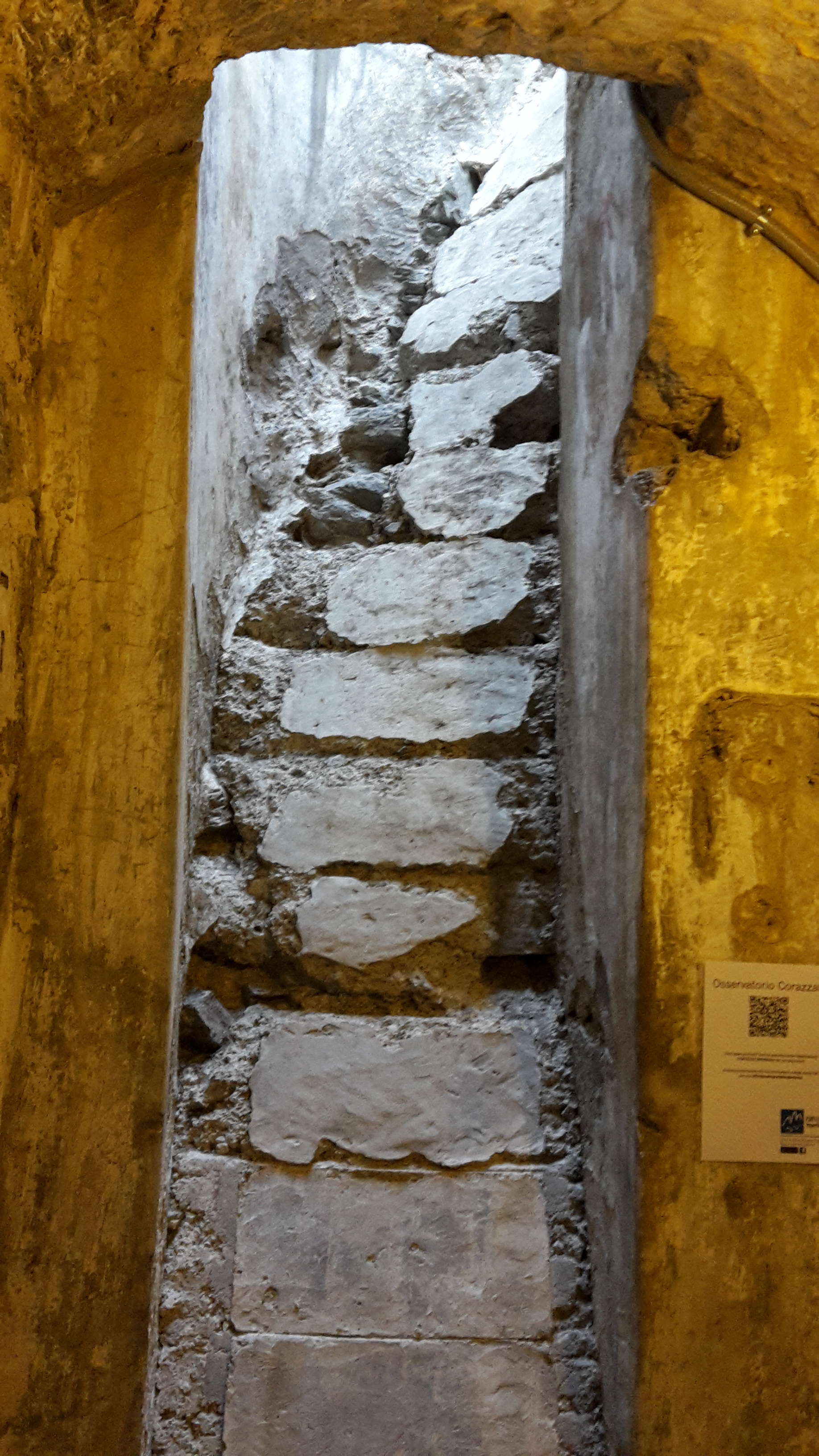 Forte Col de le Bene